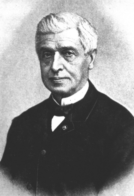 French geologist Gabriel Auguste Daubrée (1814-1896)